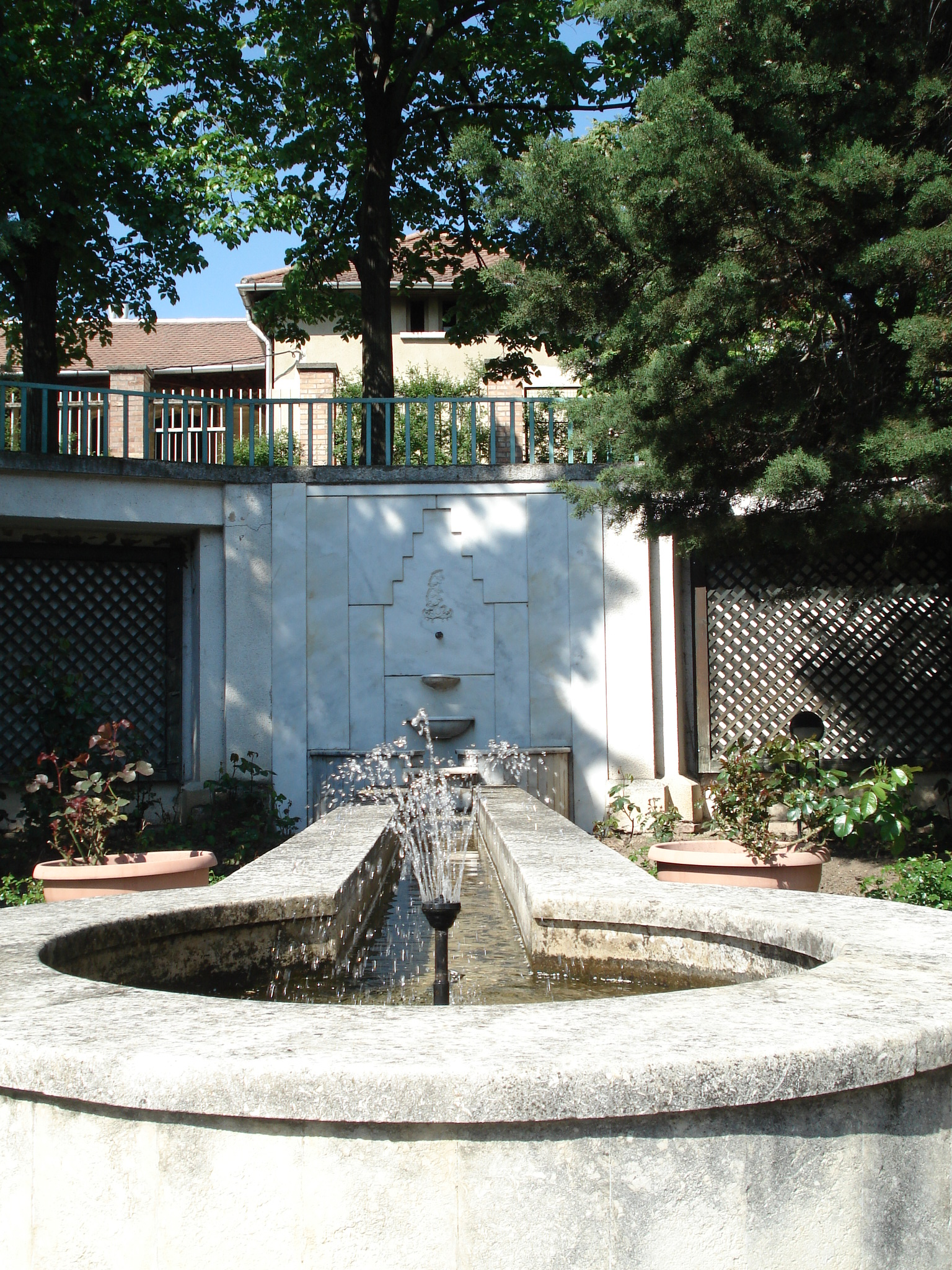 Gül Baba Türbesindeki cesme